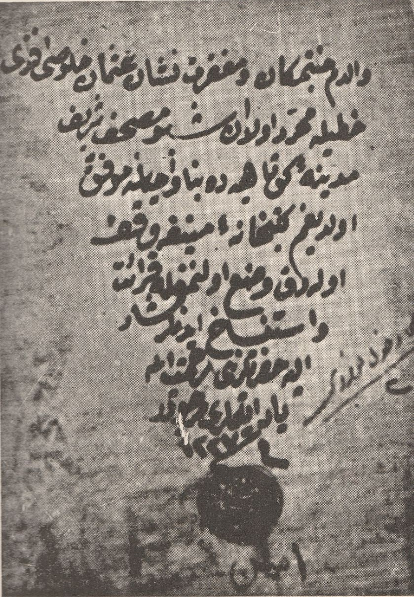 Mehmed Emin Vahid Paşa'nın El Yazısı